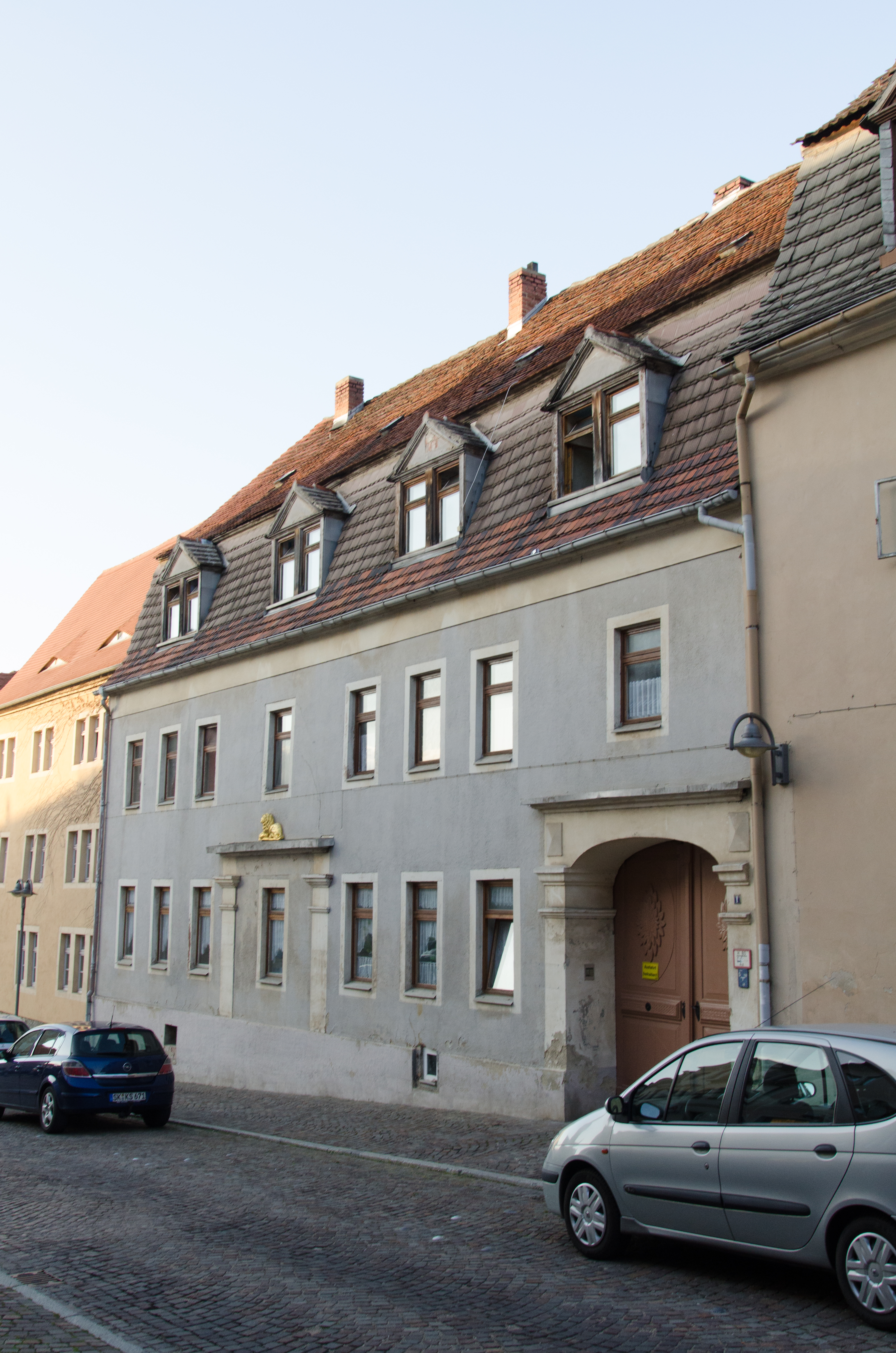 Querfurt, Nebraer Straße 1